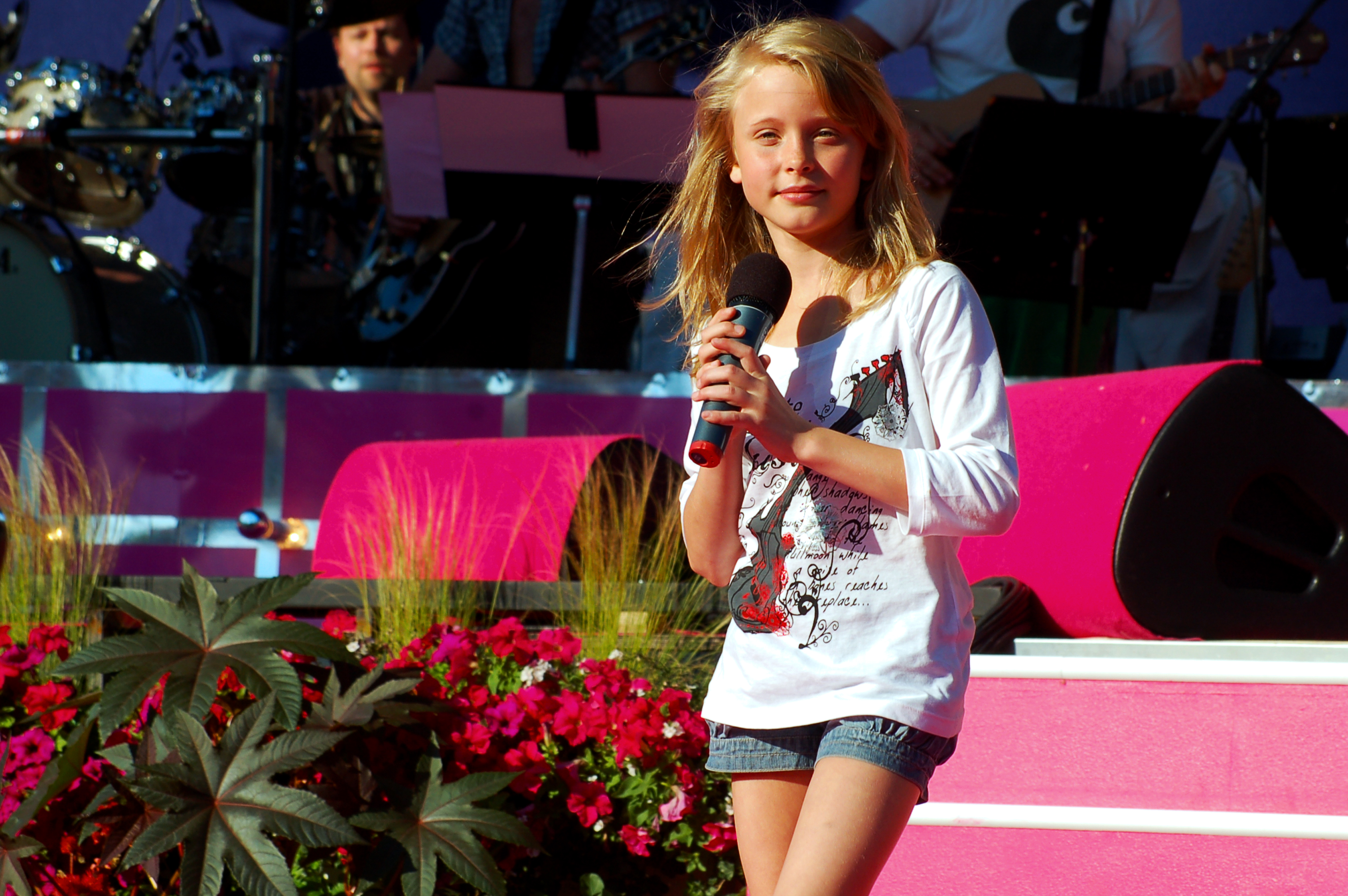 Zara Larsson uppträder på Sommarkrysset i Stockholm inne på Gröna Lund.